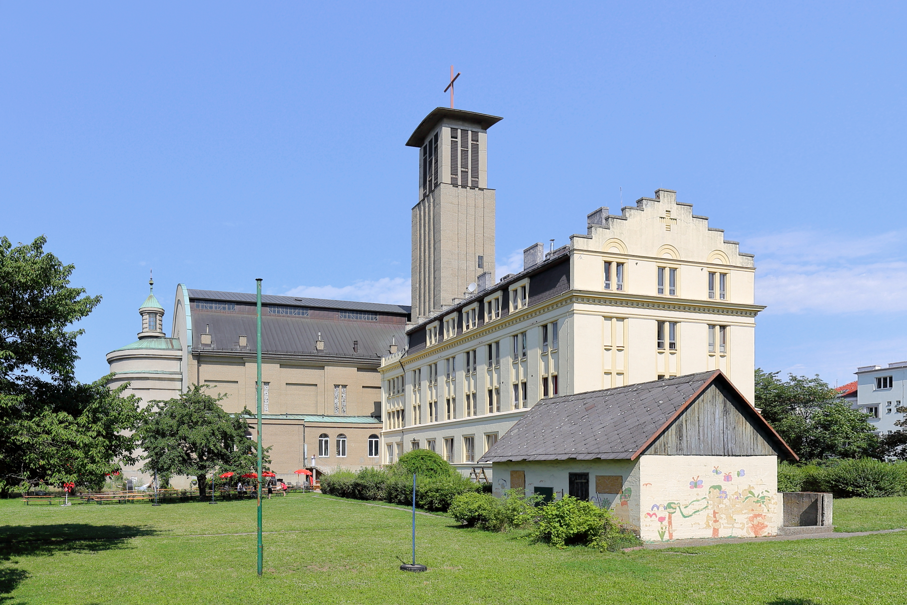 Südostansicht der ehemaligen Kloster- und Pfarrkirche Maria vom Berge Karmel (Karmeliterkirche) und des ehemaligen Klostergebäudes am Stefan-Fadinger-Platz 1 im 10. Wiener Gemeindebezirk Favoriten.Die Kirche wurde ab 1928 anstelle einer abgebrannten Notkirche nach Plänen von Hans Prutscher errichtet und erst 1942 vollendet. Sie war nach Plecniks wegweisender Pfarrkirche auf der Schmelz (1911) die zweite „Betonkirche“ in Wien. Am 21. Februar 1945 wurde sie durch Fliegerbomben weitgehend zerstört (mit 140 Todesopfern). Nach Kriegsende erfolgte der Wiederaufbau, so dass nach der Wiederherstellung von Kuppel und Dach (1950) die Unterkirche 1951 geweiht werden konnte. Die ab 1957 begonnene Wiederherstellung der Oberkirche und der Bau des Turmes erfolgte stark verändert nach Plänen von Helene Koller-Buchwieser und mit der Glockenweihe am 15.Mai 1966 wurde der Wiederaufbau abgeschlossen. Mit Jahresende 2014 erfolgte die Übergabe des Gotteshauses mit Klostergebäude und Garten mangels Gläubiger, Priestermangel und Kostenreduktion, etc. an die aufstrebende syrisch-orthodoxe Metropolie.